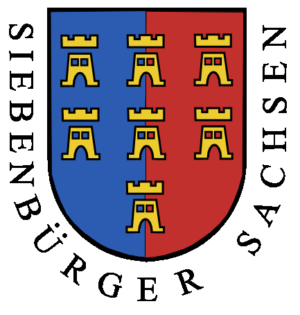 Stema „Universității Săsești” (în germană Nationsuniversität, cu numele complet Sächsische Nationsuniversität (Universitatea Națiunii Săsești), în maghiară Szász Nemzeti Egyetem, în latină Universitas Saxonum) înfiinţată în 1486 din ordinul lui Matei Corvin. Se pot vedea în cadrul ei cele Șapte Scaune administrative ale comunităților săsești subordonate Scaunului Sibiului.